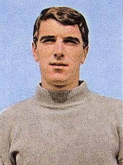 Dino Zoff che indossa la maglia del Mantova